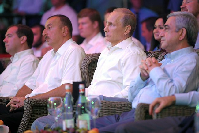 Владимир Путин посетил международный турнир по боевому самбо «ПЛОТФОРМА S-70».